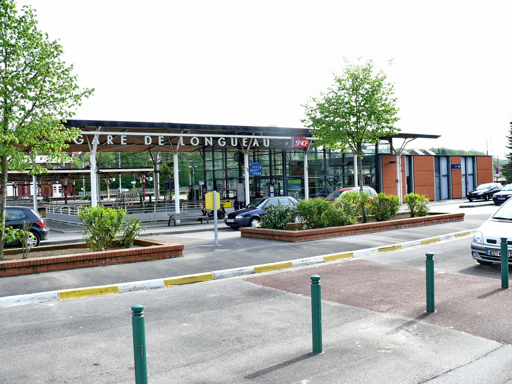 La Gare de Longueau, vue depuis son parking